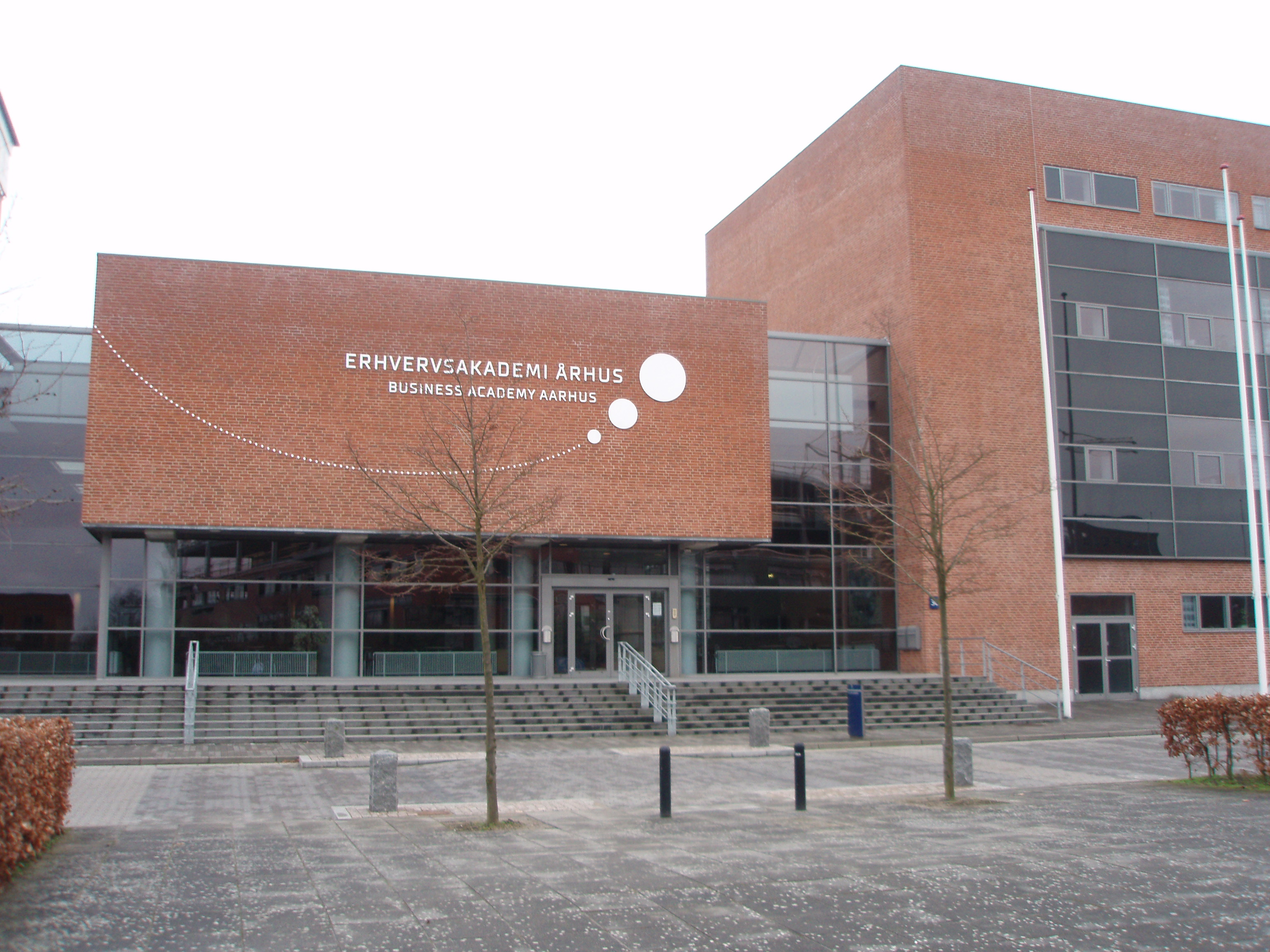 Erhvervsakademiet, Århus Købmandsskole